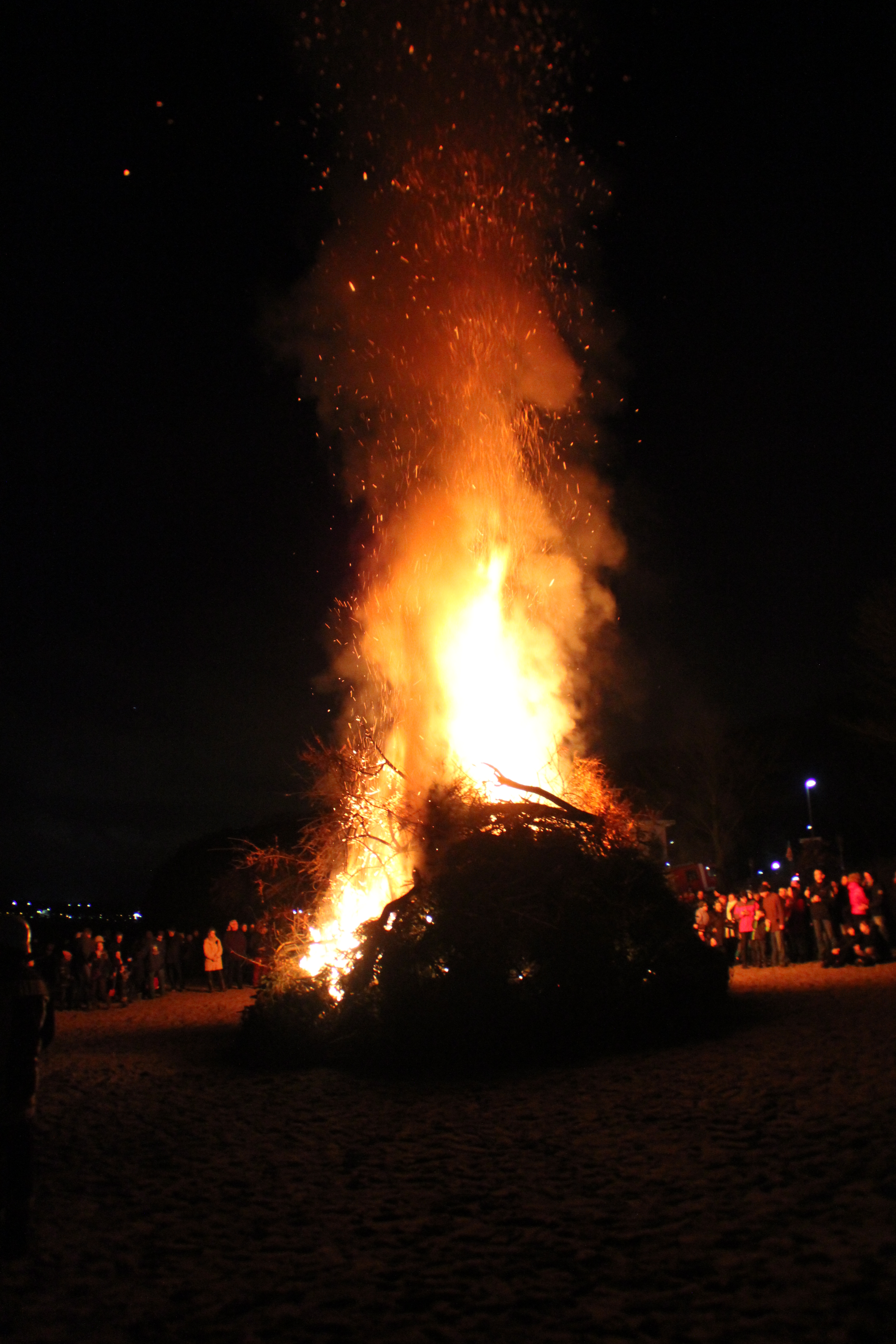 Biikebrennen in Wassersleben (2014), nach der Entzündung